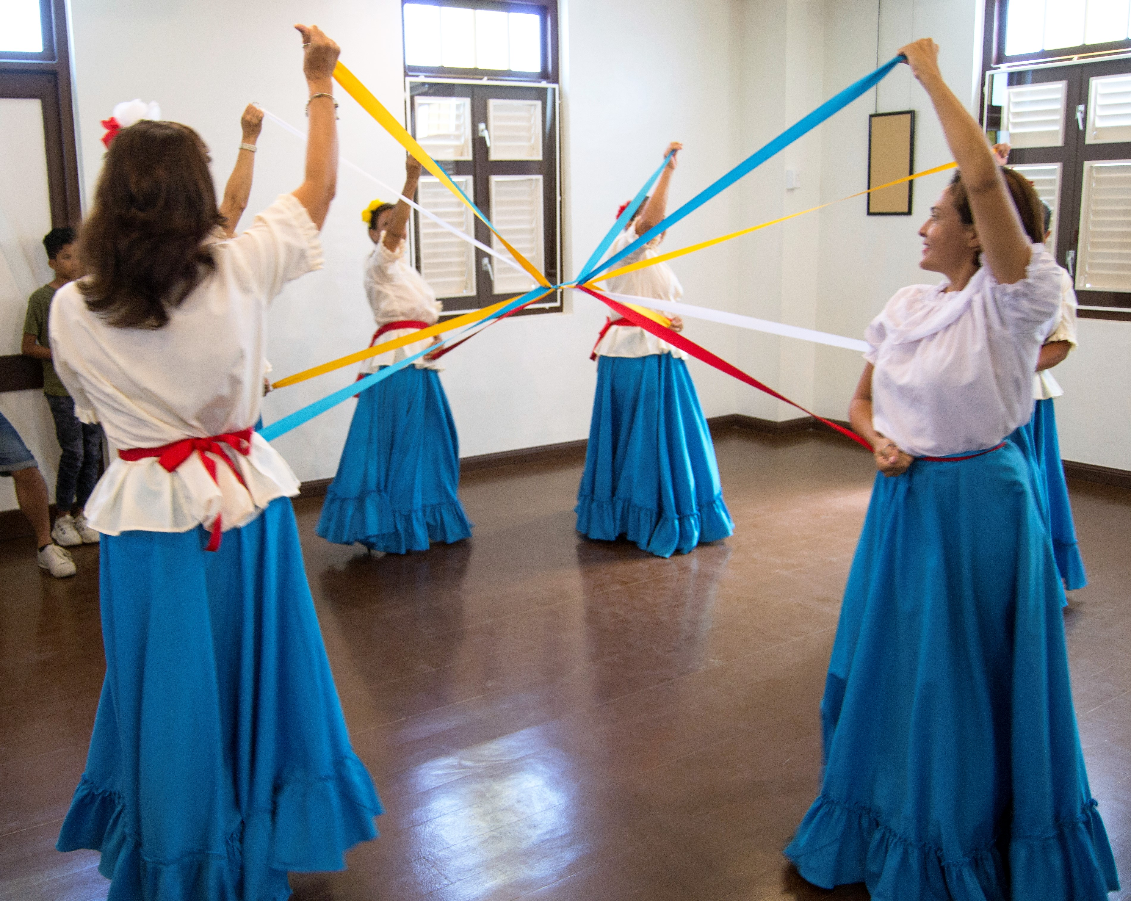 Linten dans Aruba